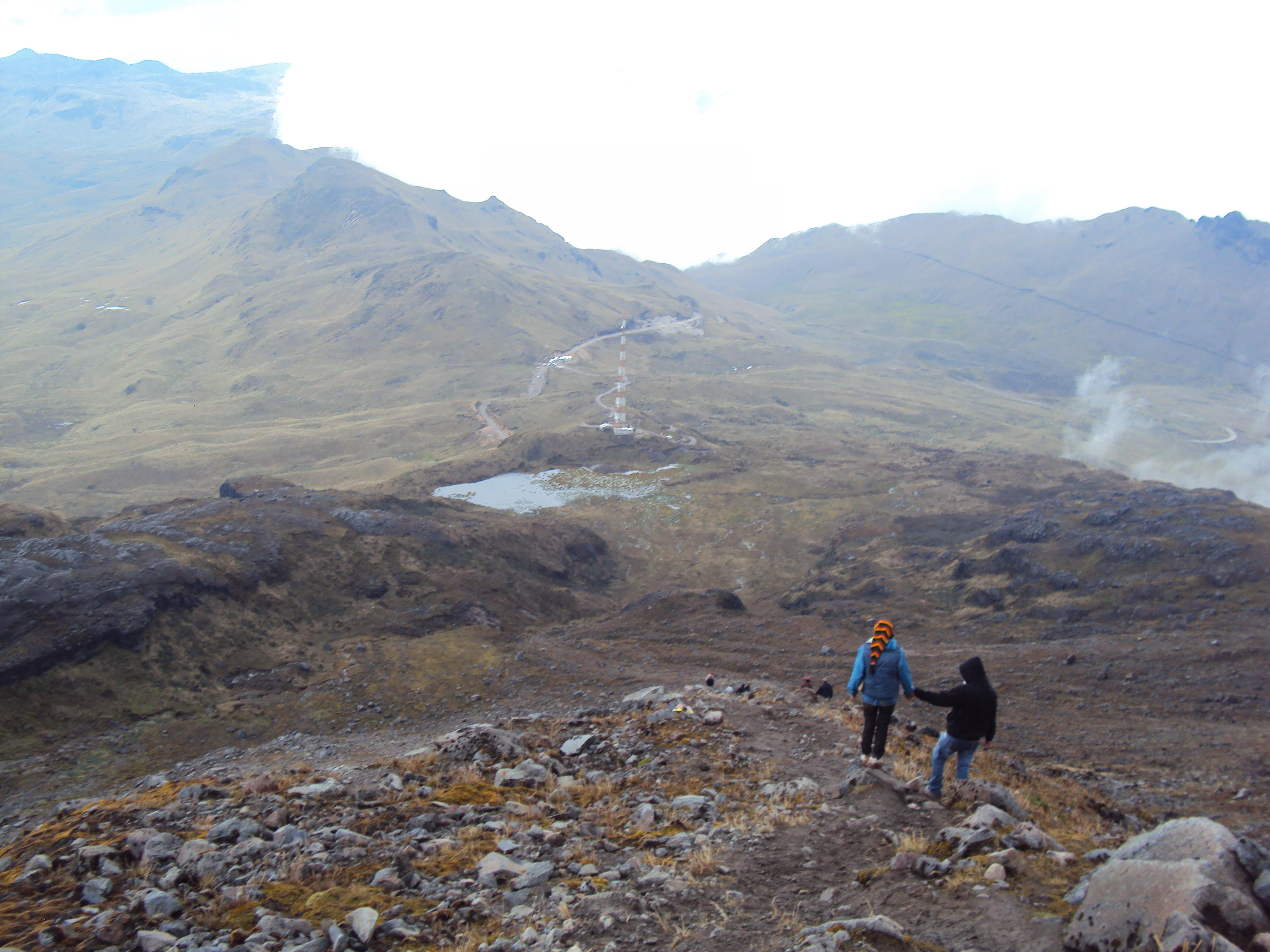 Antena autosoportada ubicada a mayor altitud en la provincia del Carchi